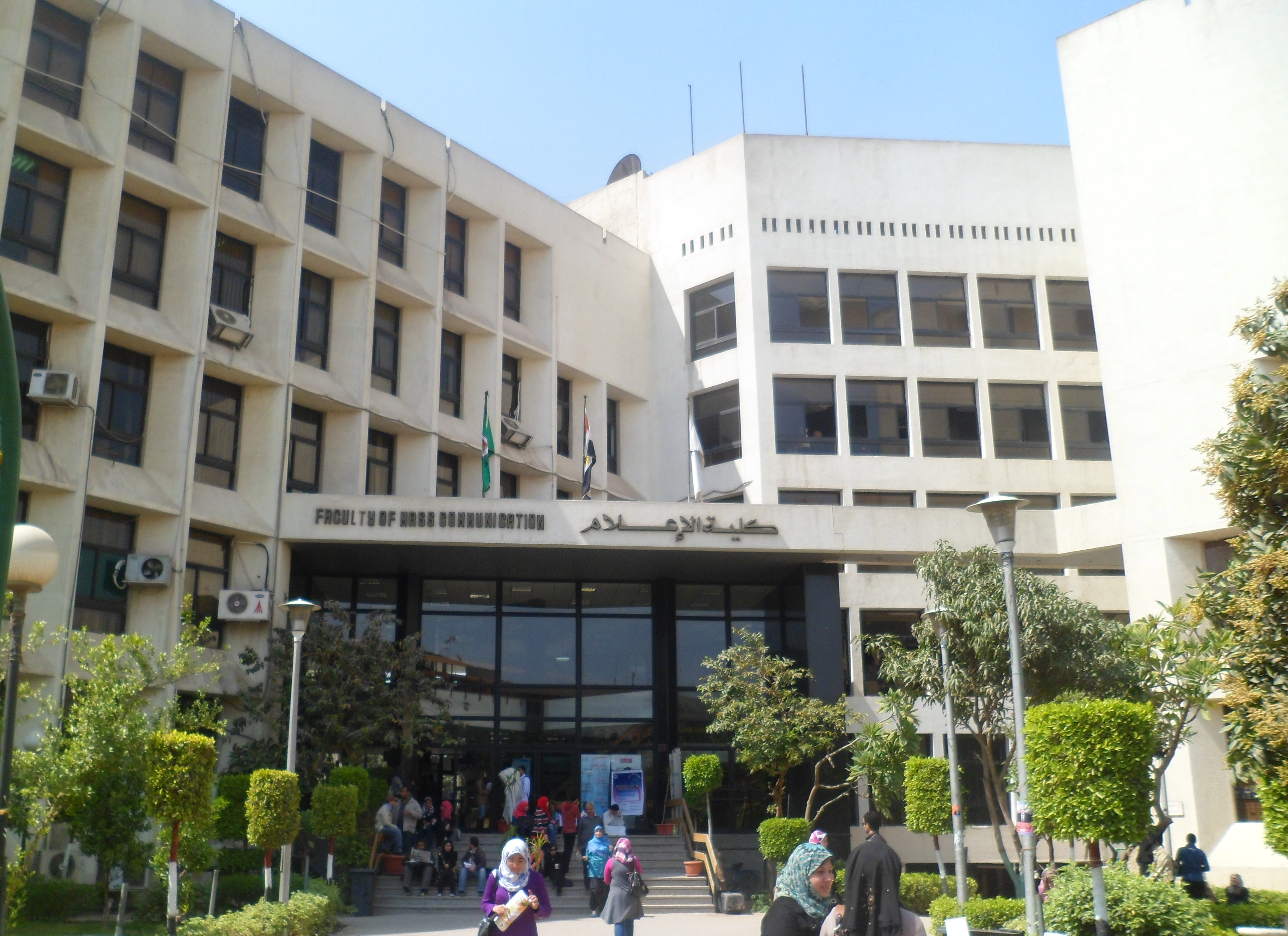 كلية الإعلام، جامعة القاهرة